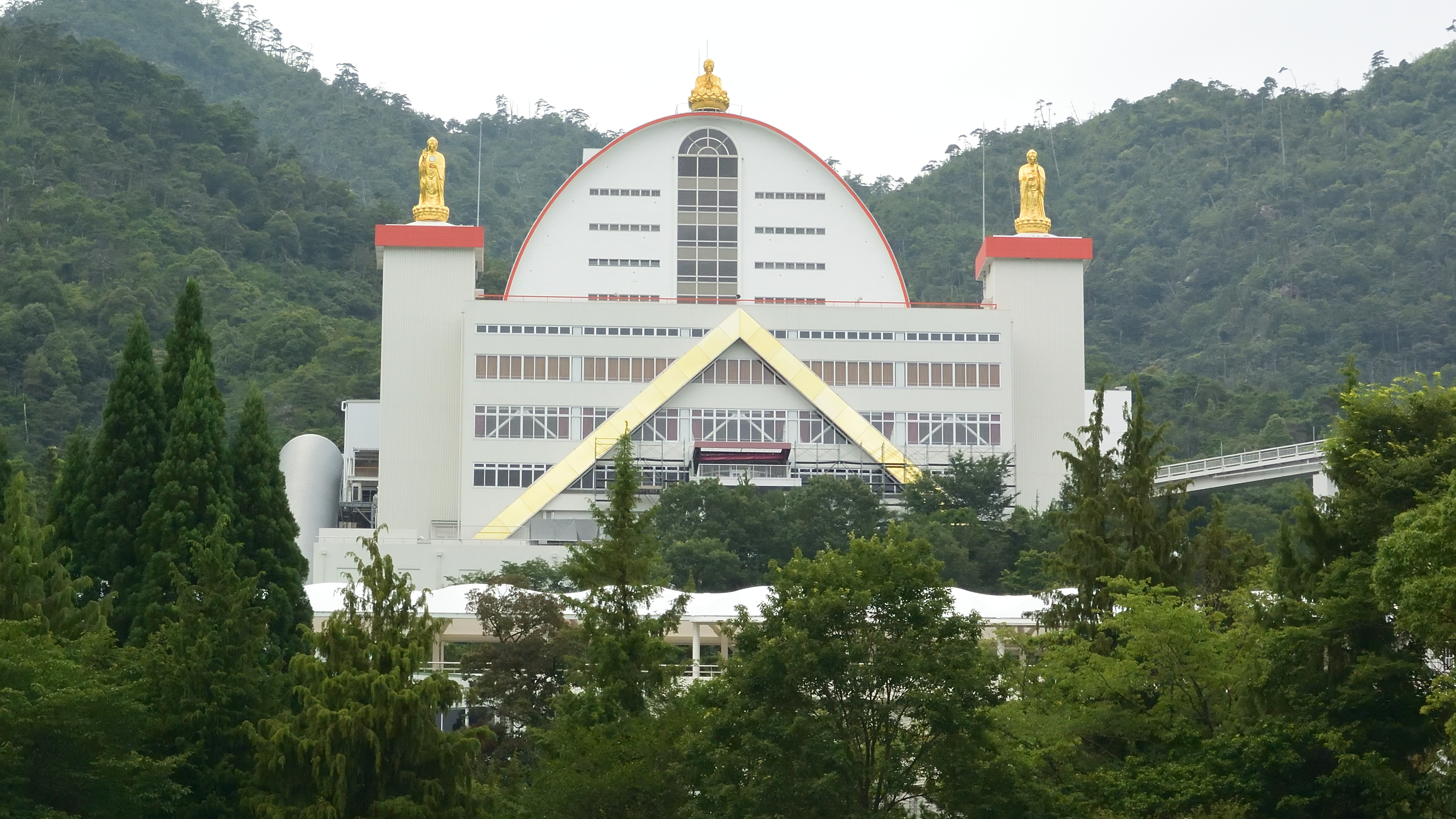 海の見える杜美術館